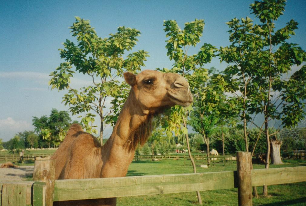 Camel from Bursa